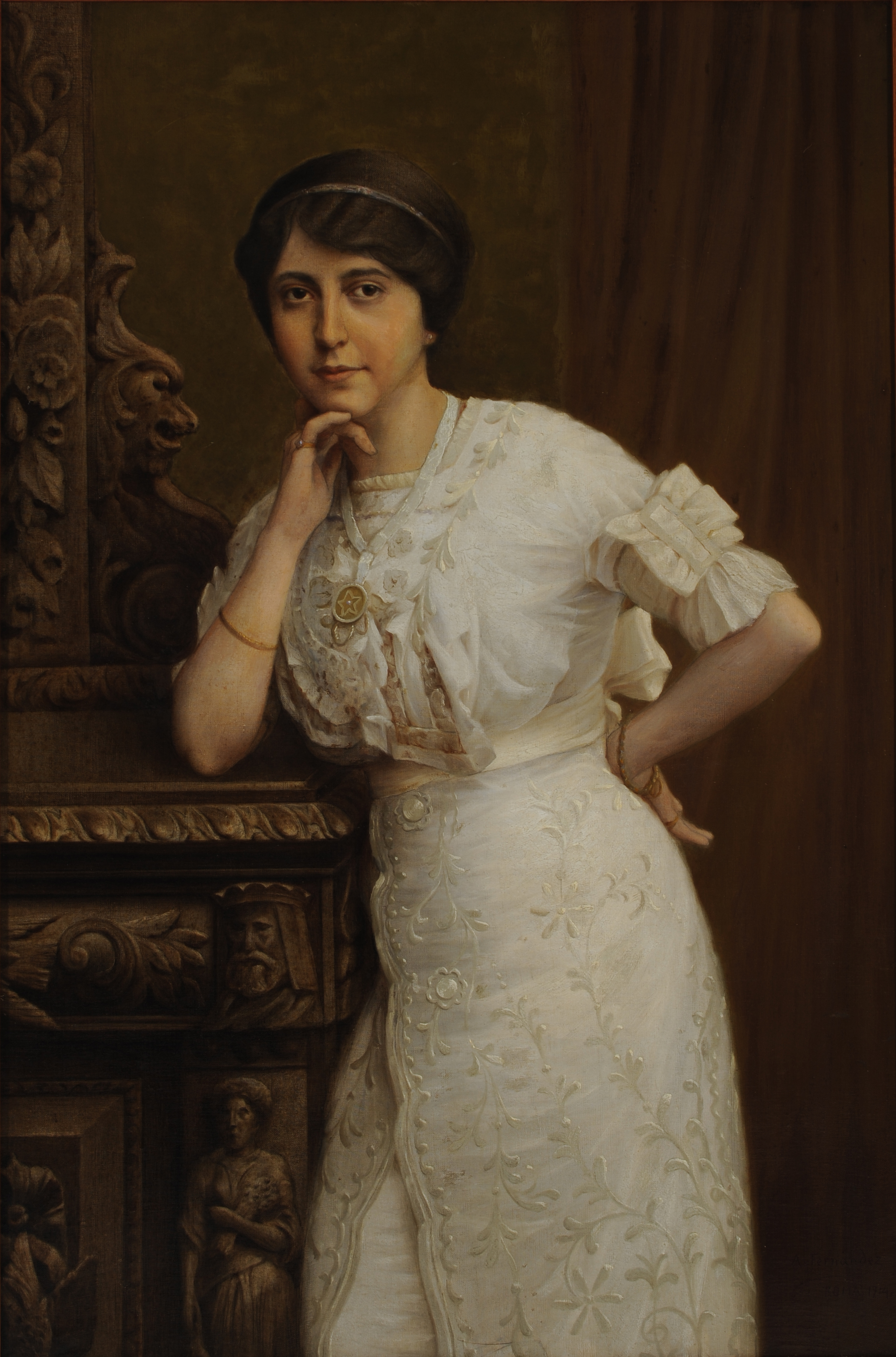 Obra que integra o acervo do Museu Paulista da USP. Coleção José Carlos de Macedo Soares.